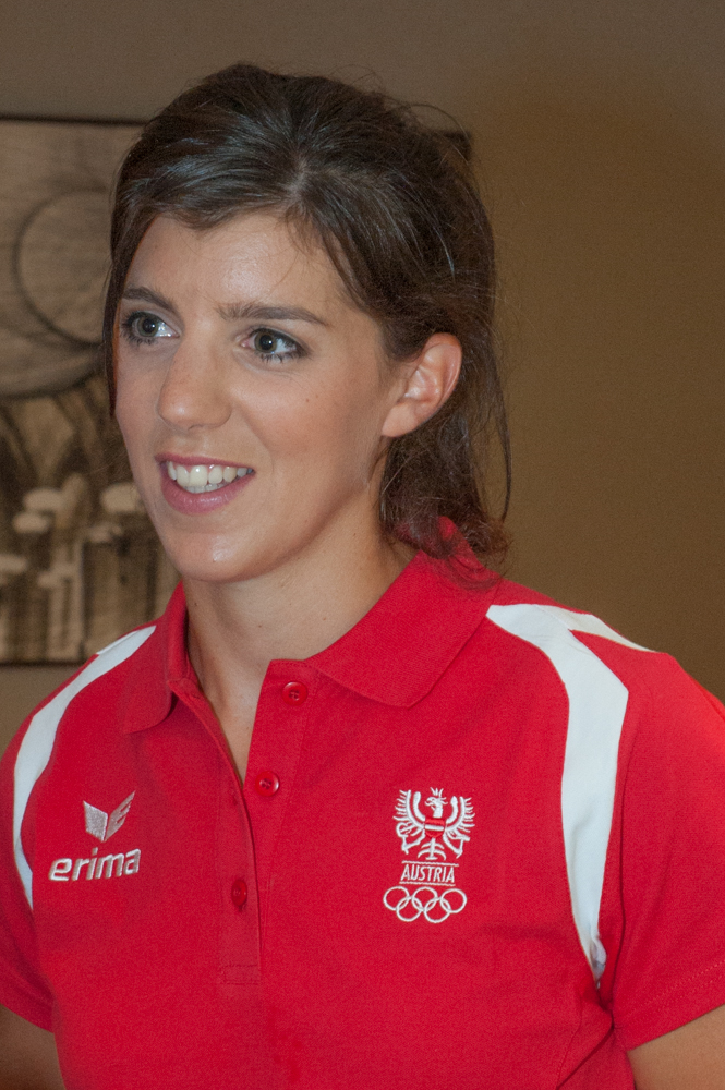 Einkleidung der Österreichischen Teilnehmer an den Olympischen Sommerspielen 2016 am 16./17. Juli 2016 in Wien. Bild zeigt Magdalena Lobnig.